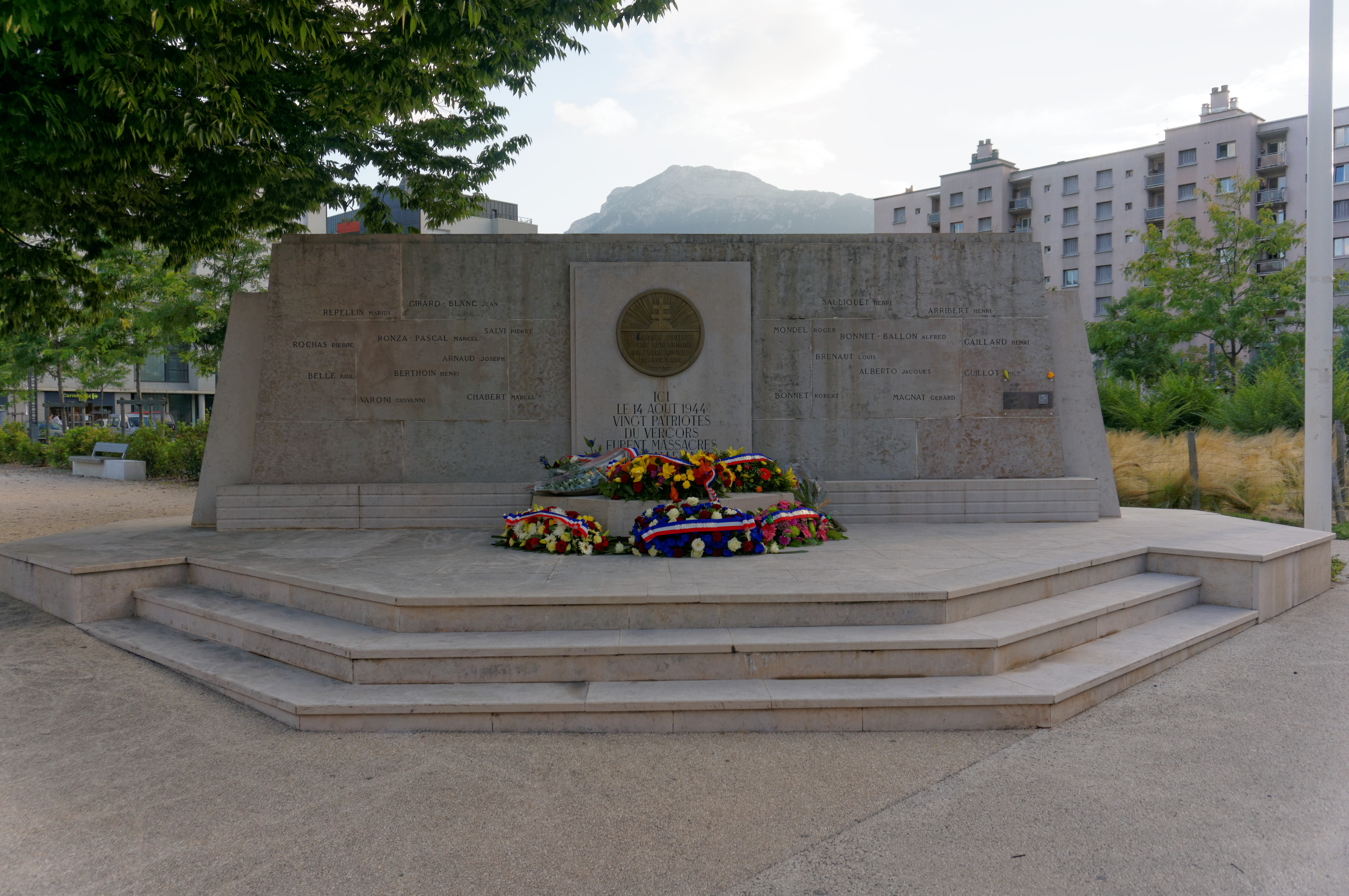 Le mémorial du square des Fusillés à Grenoble fleuri après la commémoration du 70eme anniversaire.